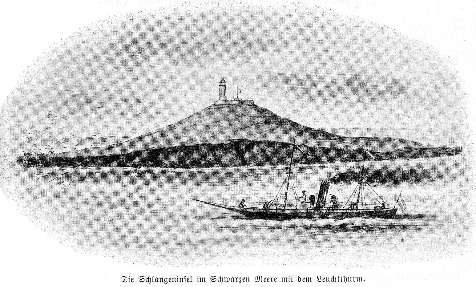 Snake Island in 1896